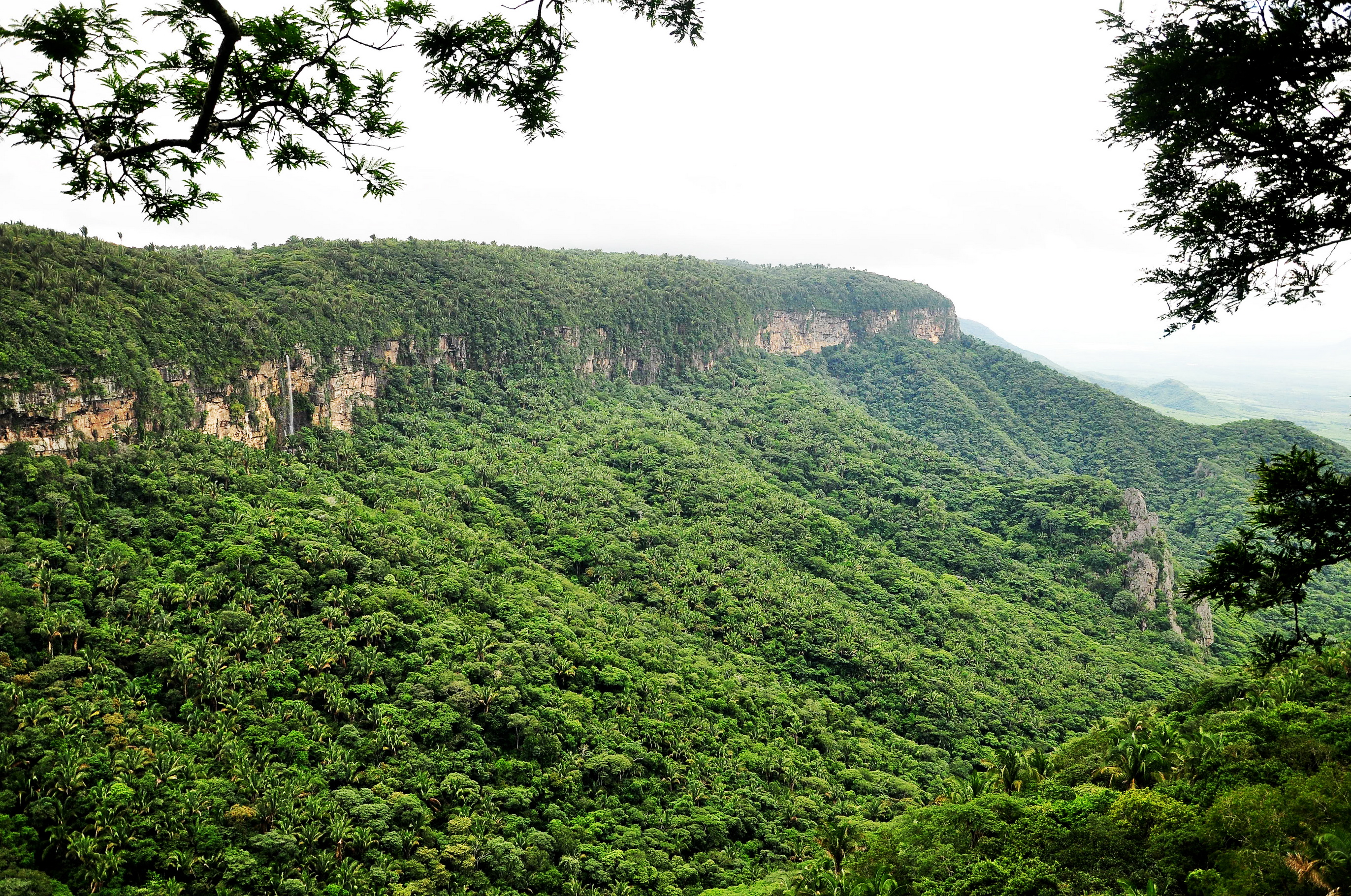 Fotos feitas no âmbito de Ubajara/Ce